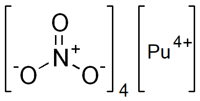 Dusičnan plutoničitý